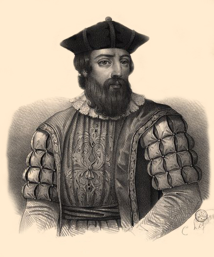 Henrique de Meneses, sétimo governador-geral da Índia Portuguesa.